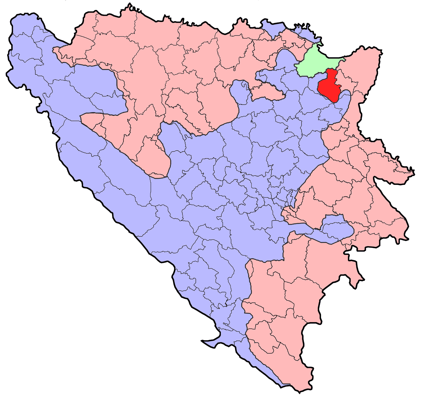 Republika Srpska (BiH) municipality